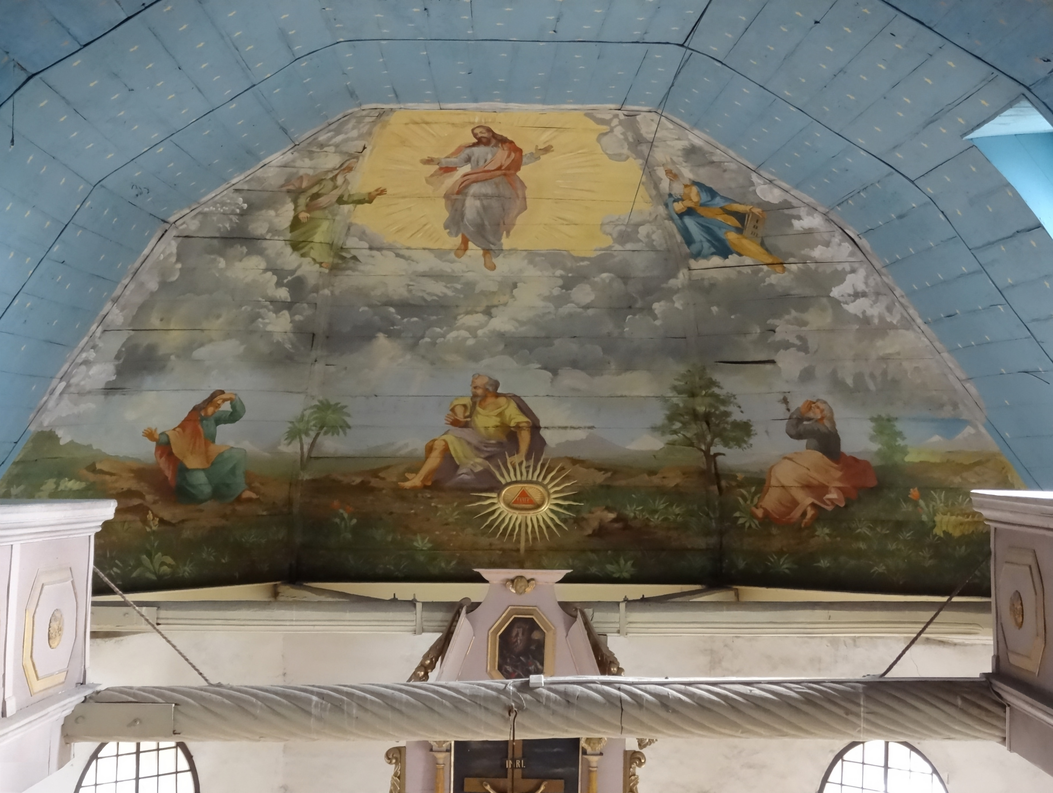 St. Peter und Paul Großmonra, Deckenbild über dem Altar